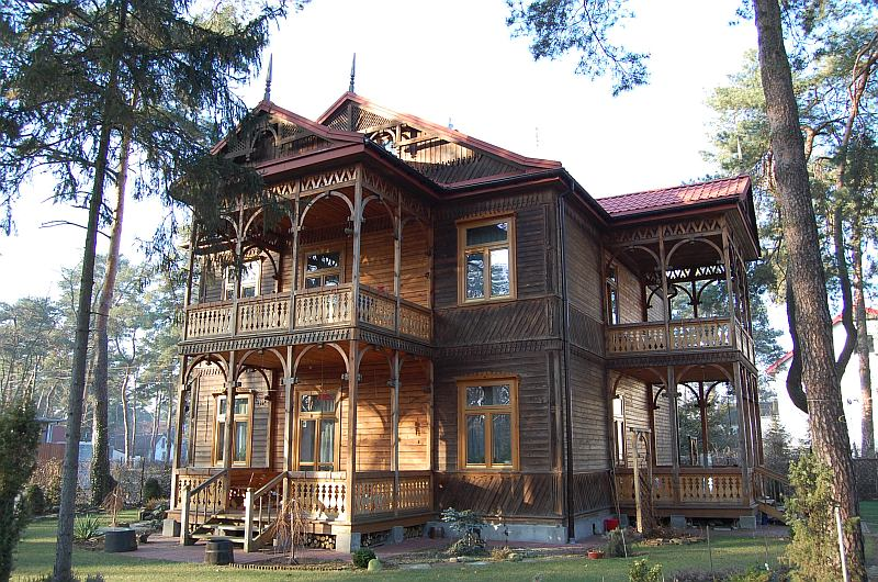 Willa "Lodusieńka". Budynek wybudowany w stylu świdermajer w 1934 roku. Zabytek Warszawy.